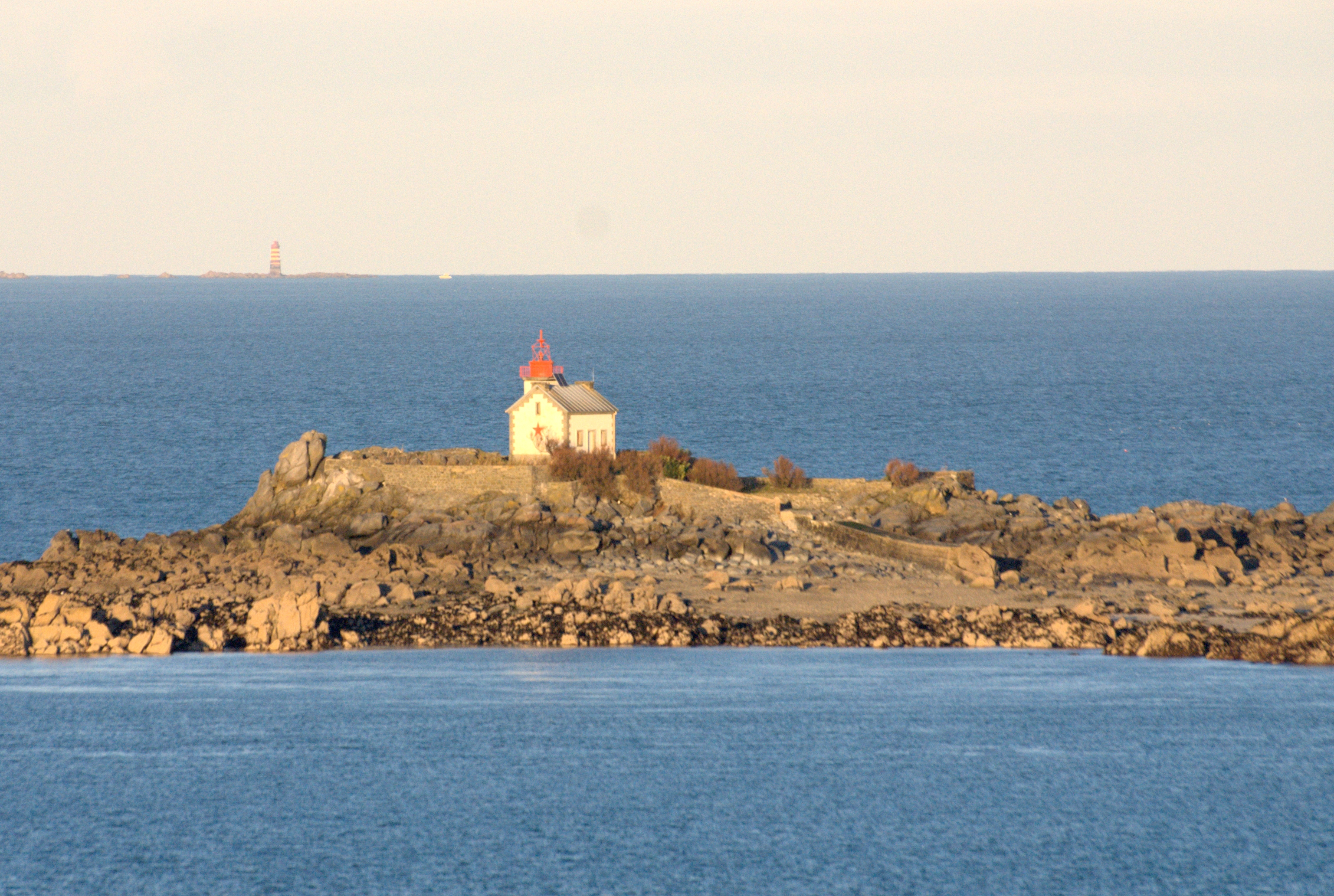 Phare de l'Île Harbour, situé sur l'îlot Harbour, au large de Saint-Quay-Portrieux. Au large, le Grand Léjon